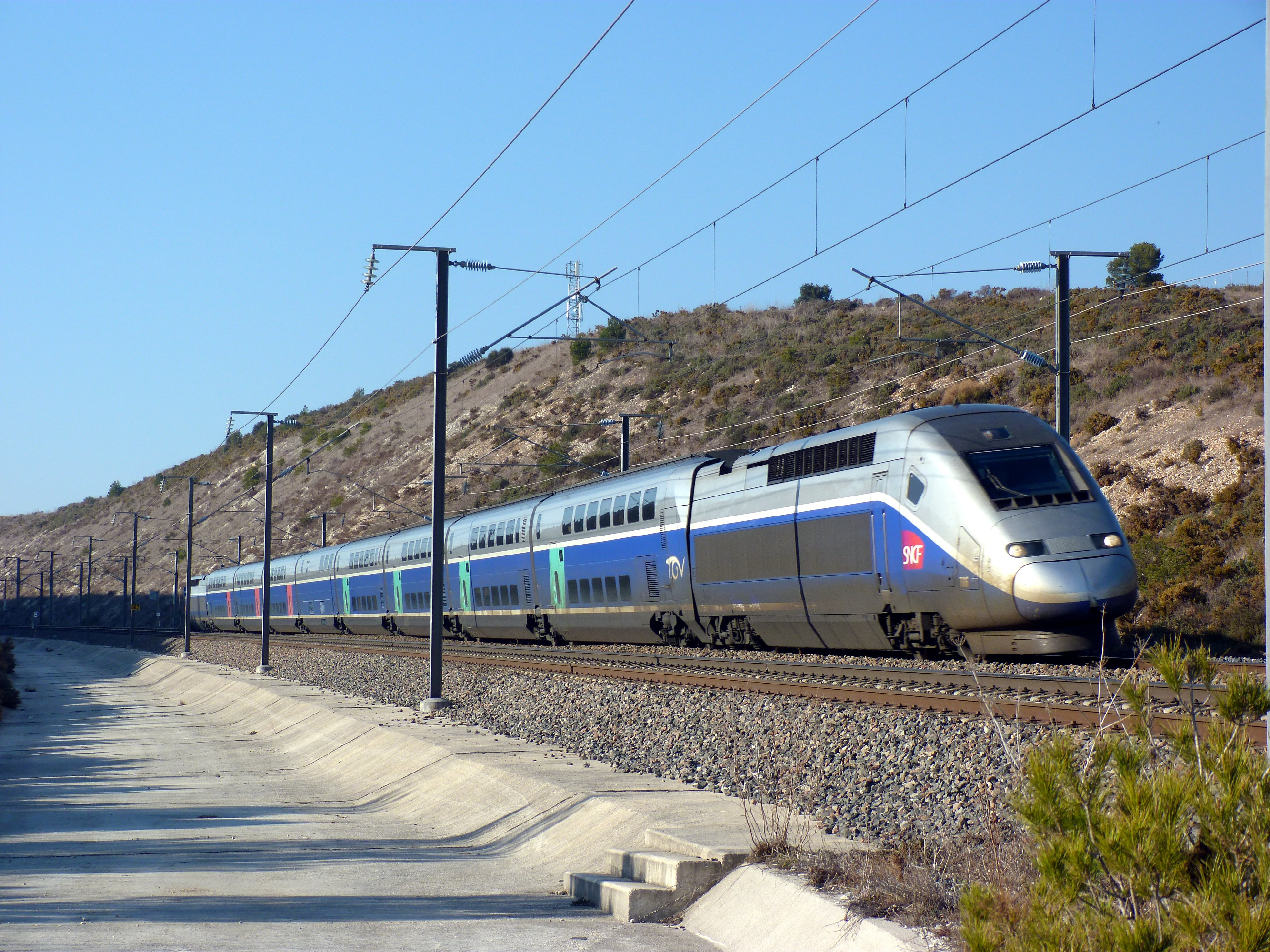 TGV Duplex Dasye n°706 en direction de Marseille, à l'entrée du viaduc de Ventabren.